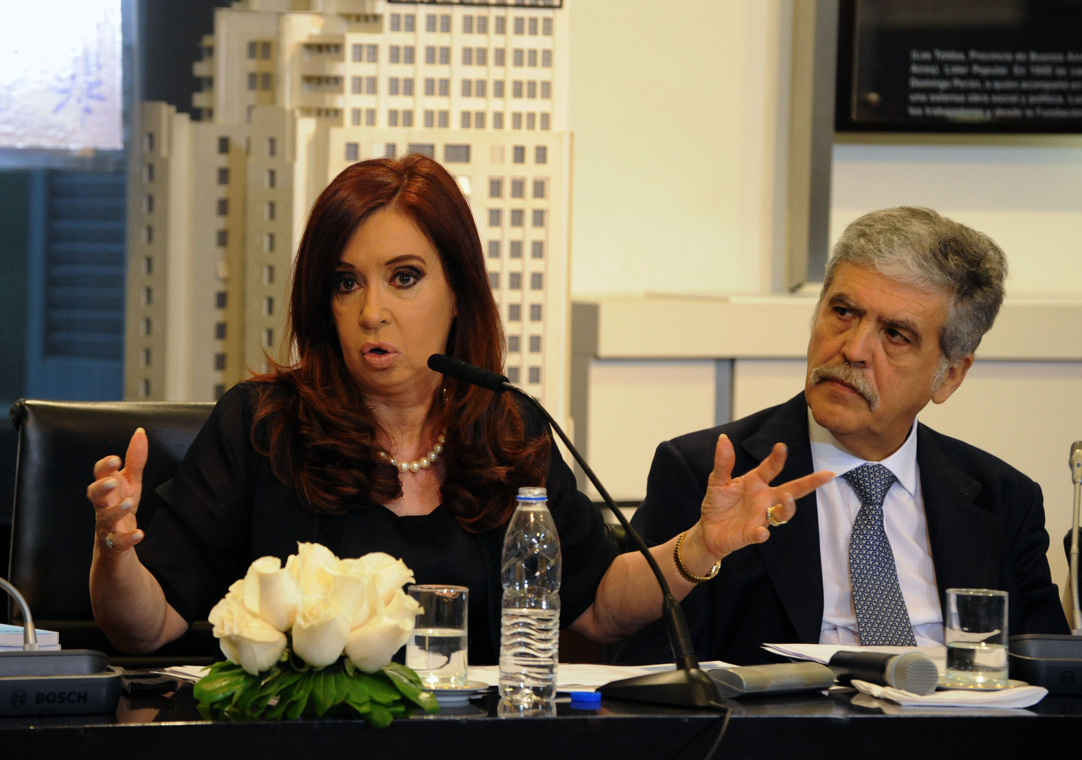 La presidenta encabezó un encuentro con jefes comunales de las secciones segunda, cuarta, quinta, sexta y séptima secciones electorales de la provincia de Buenos Aires, en la cual se presentó el plan de obras "Mas cerca".